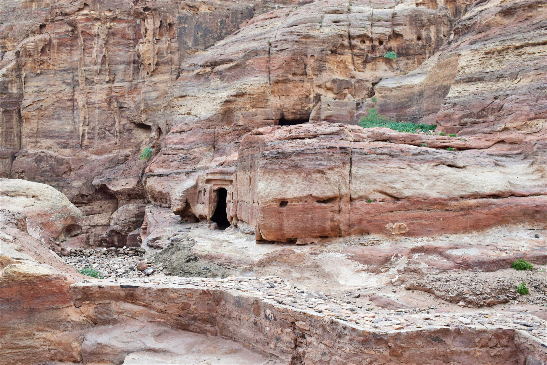 Protection de l’érosion d’un wadi près de Pétra avec des gabions.